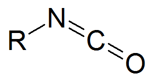 Isocyanaatester algemeen